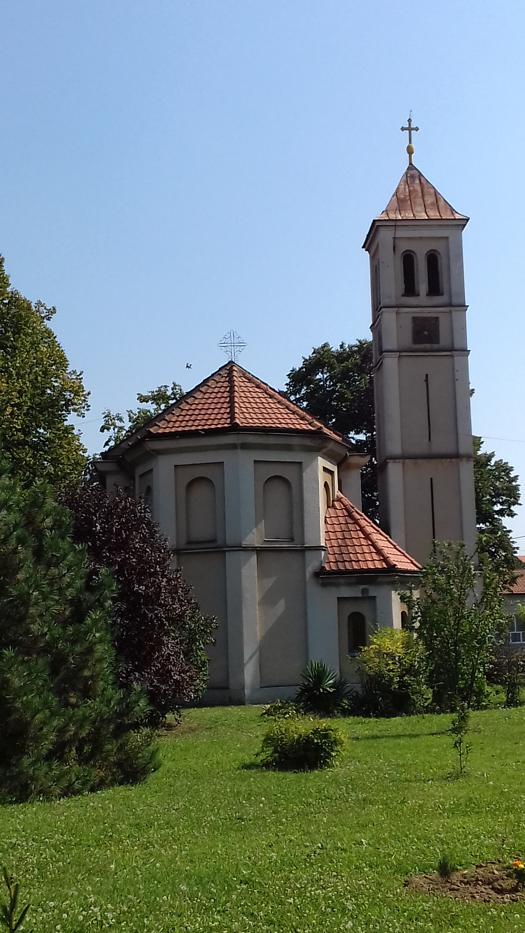 Srpski (latinica): Katolička crkva u Bijeljini